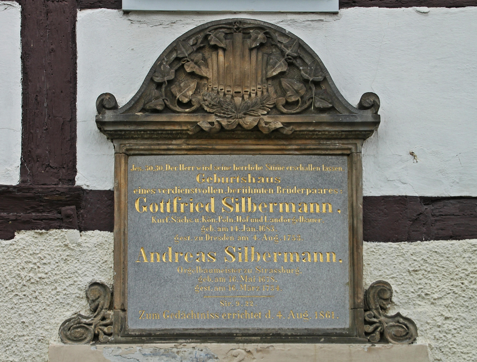 Gedenkplatte am Wohnhaus der Familie Silbermann in Kleinbobritzsch. Das Haus wurde 1680 von Michael Silbermann (1640-1713) erbaut. Seine Söhne waren die berühmten Orgelbaumeister Andreas Silbermann (1678-1734) und Gottfried Silbermann (1680-1753), die bis zum Umzug der Familie nach Frauenstein 1685/86 hier ihre Kindheit verbrachten.